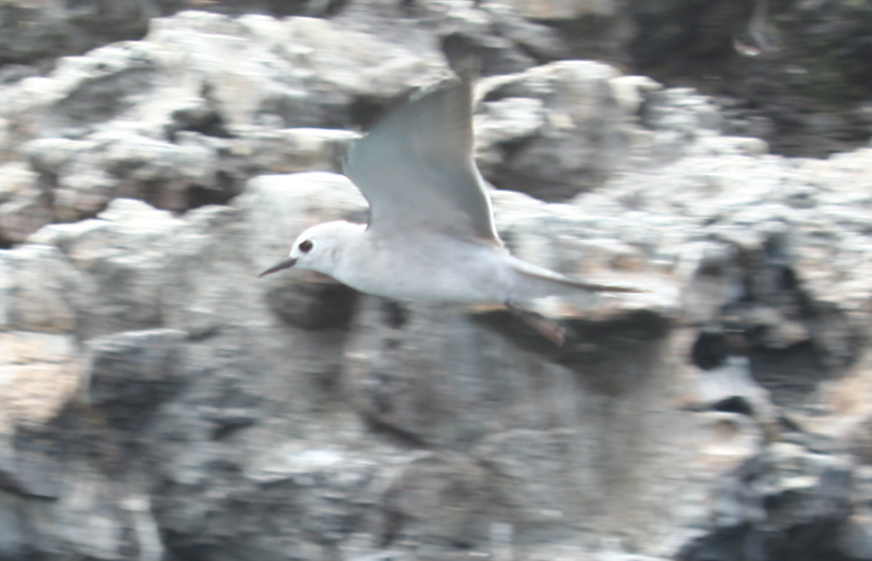 Blue Noddy Anous ceruleus at La Péruse Pinnacle, French Frigate Shoals, Hawaii